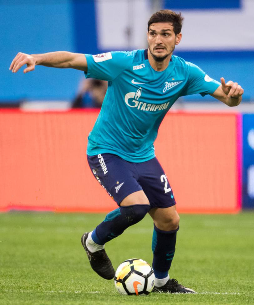 03.03.2018. Россия, Санкт-Петербург, стадион«Санкт-Петербург». РОСГОССТРАХ-Чемпионат России 2017/18, «Зенит» — «Амкар».